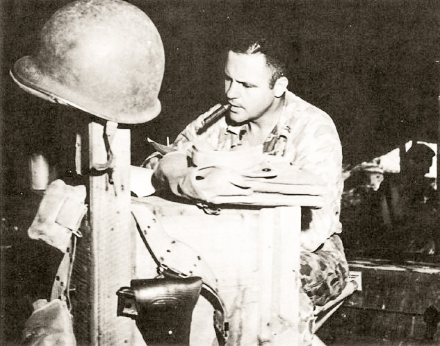 Le colonel David M. Shoup en 1943 lors des opérations à Tarawa.